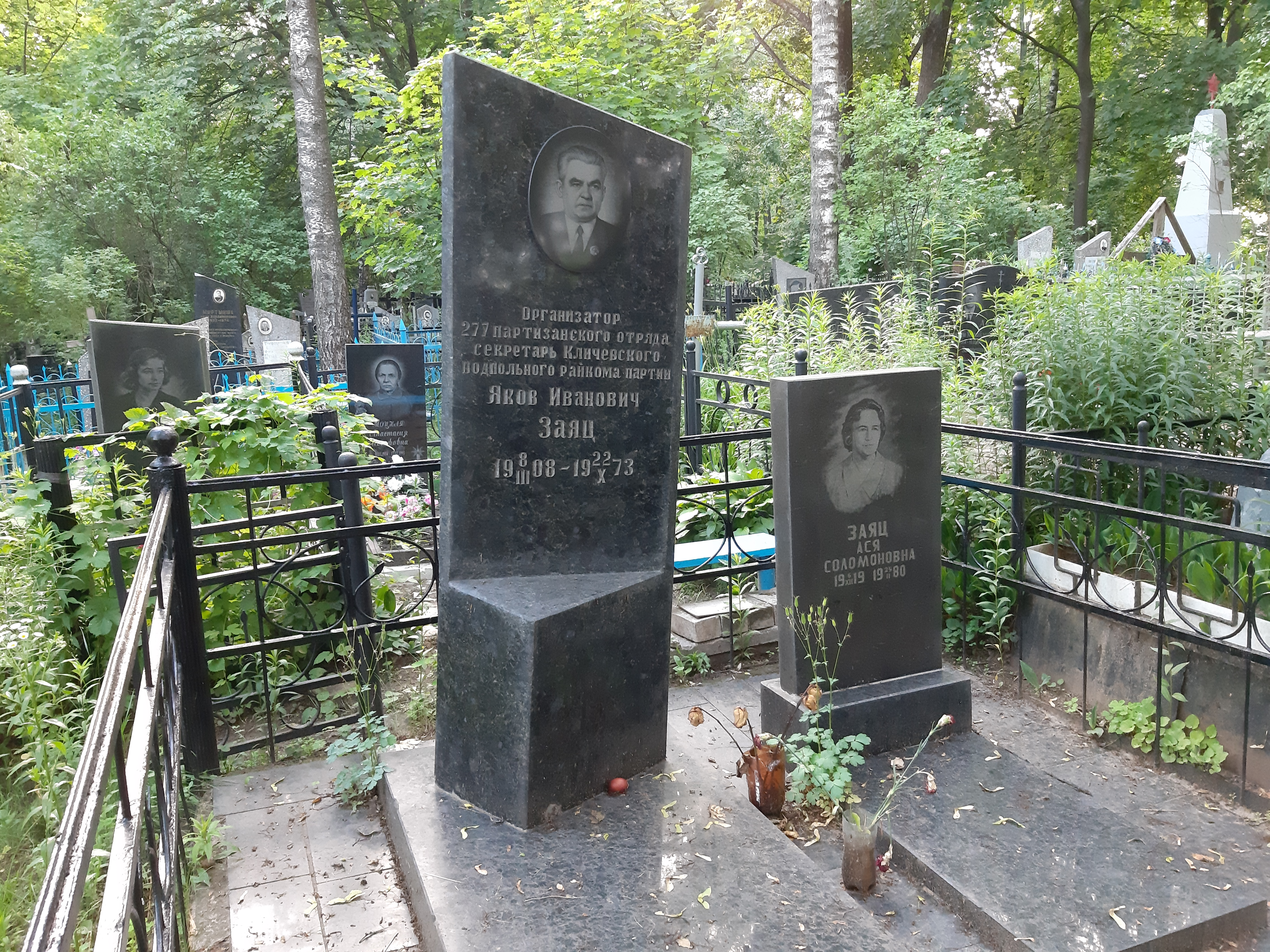 Магілёў. Машэкаўскія могілкі